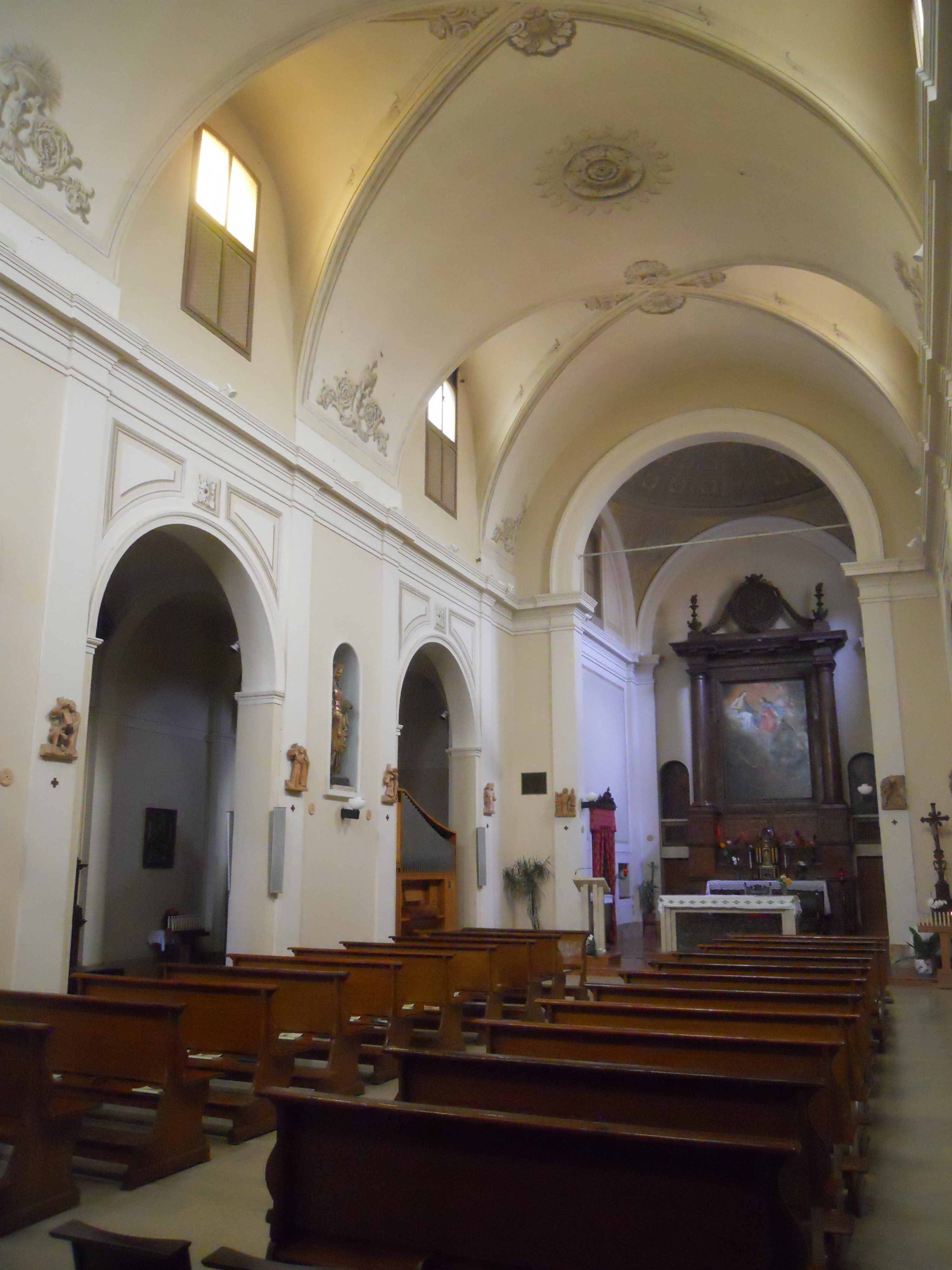 Interno a tre navate della chiesa di Santa Maria degli Angeli a Ravenna.